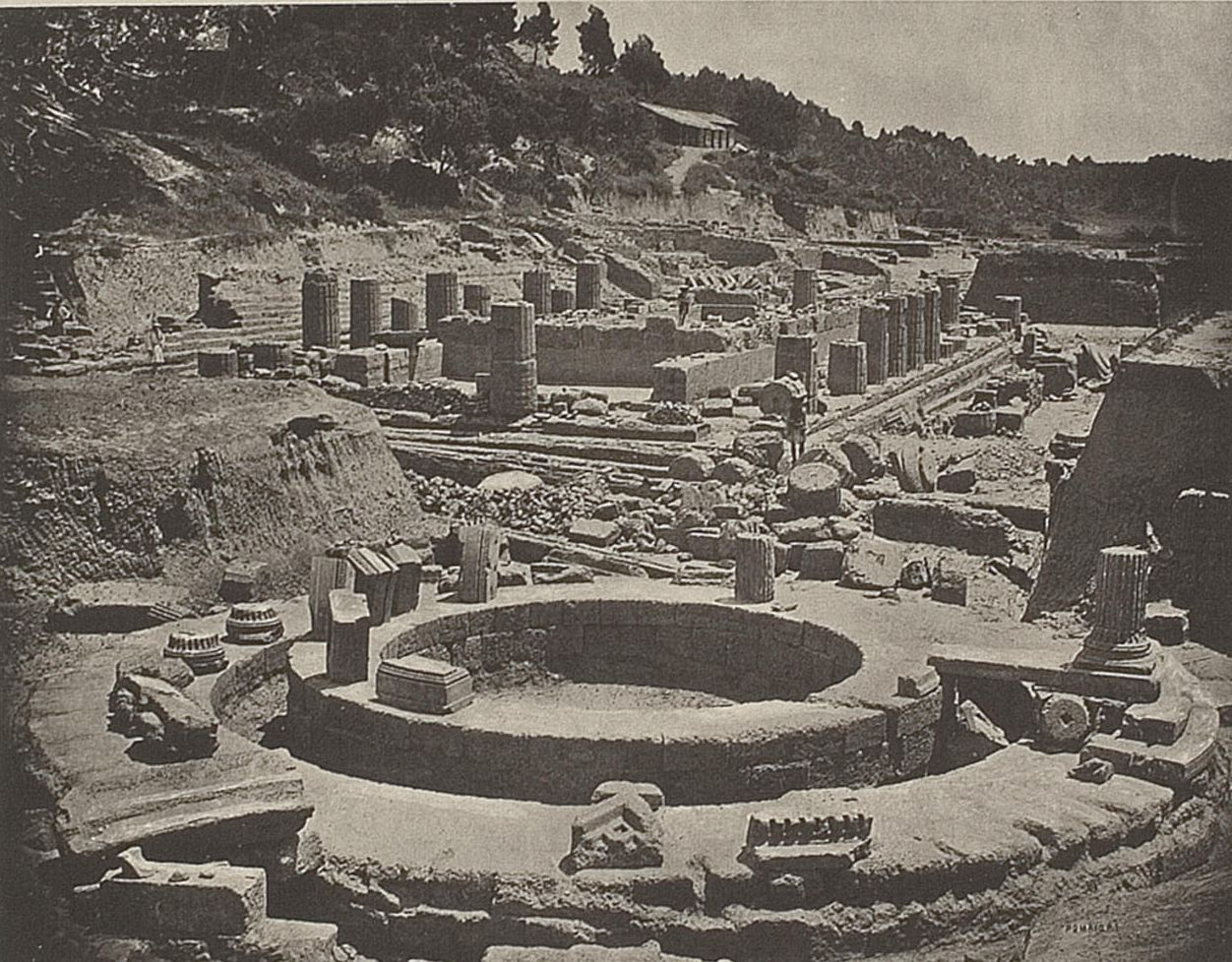 Philippeion und Heraion von Südwest. Hinter dem Heraion, in dessen Opisthodom man hineinblickt, wird links die Stufenterrasse am Fuss des Kronion sichtbar; dahinter die Exedra des Herodes Atticus und ganz im Hintergrunde das Westende der Thesaurenterrasse. Am Heraion sind die Hermesbasis, die Nordwest- und Südwestecke durch Menschen markirt. Davor ziehen sich einige Wasserleitungen die Westseite des Tempels entlang. Ganz im Vordergrunde auf dem inneren Ringe des Philippeionfundamentes Theile der reich und sauber gearbeiteten marmornen Statuenbasen aus dem Innern des Rundtempels. Auf dem äusseren Ringe zum Philippeion gehörige Architecturstücke und Säulenbasen, Architrav- und Cassettentheile etc., welche aus den späten Mauern der Umgebung hervorgezogen werden. Rechts vorne der Versuch, einen Theil der Marmorstufen aus ihren alten Bestandtheilen wieder aufzubauen, um deren Construction und die Anordnung der Säulen zu erläutern, welche das Philippeion rings umgaben.